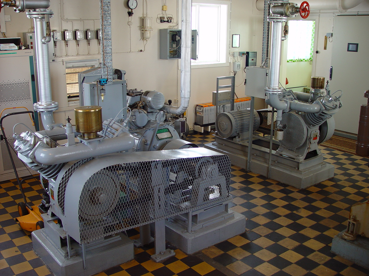 Maskinrom til tåkelur på Lindesnes fyr